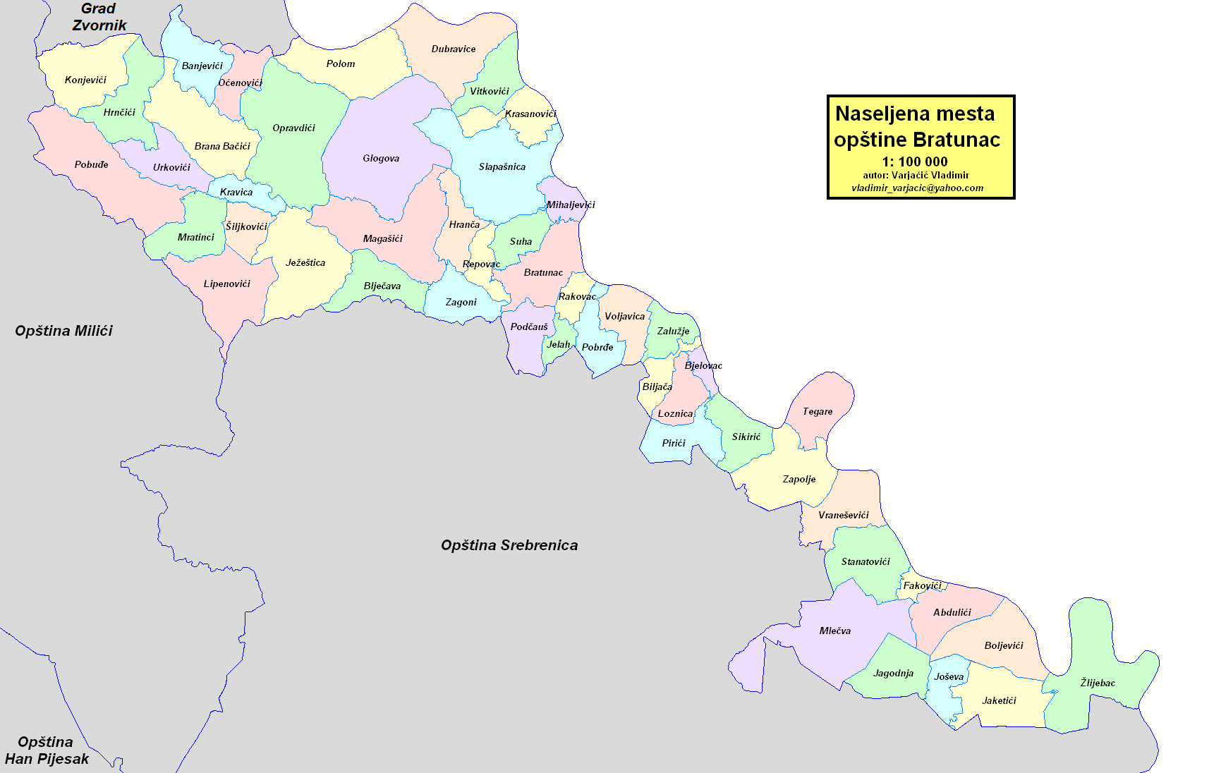 Opština Bratunac